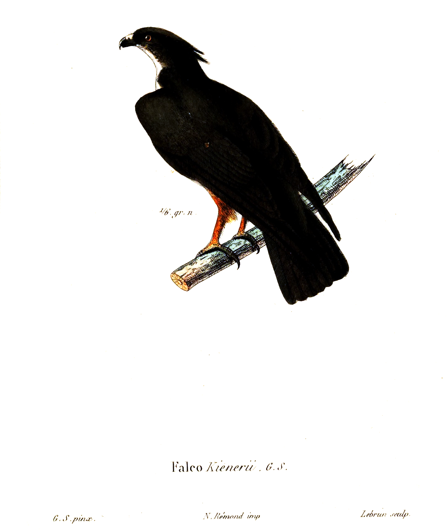 Falco kienerii = Hieraaetus kienerii